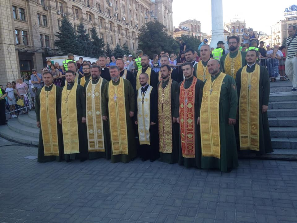 Капелани стали до фото на репетиції військового параду в 2018 році